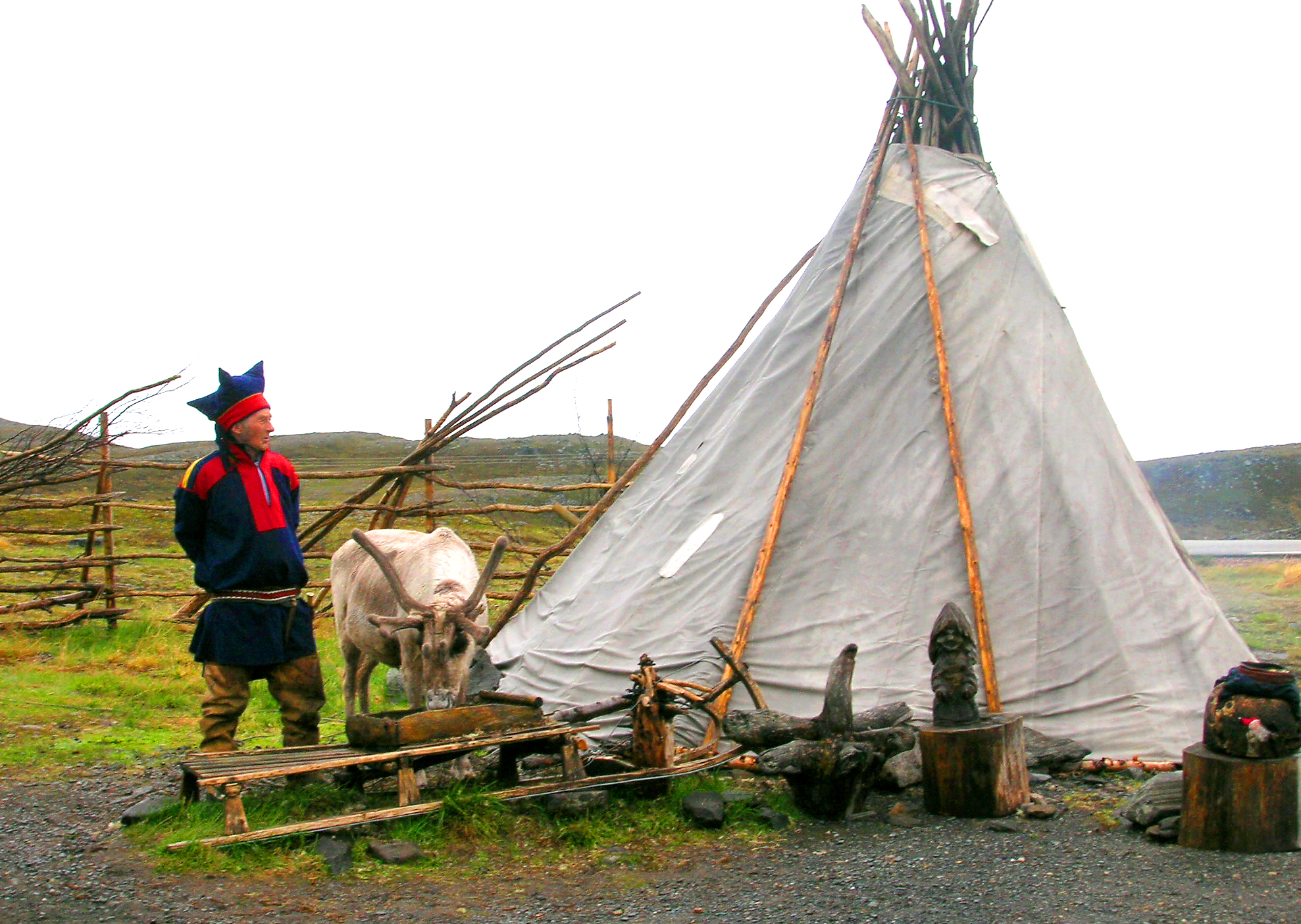 Sami-Sieddlung beim Nordkapp an Norwegen(2006)